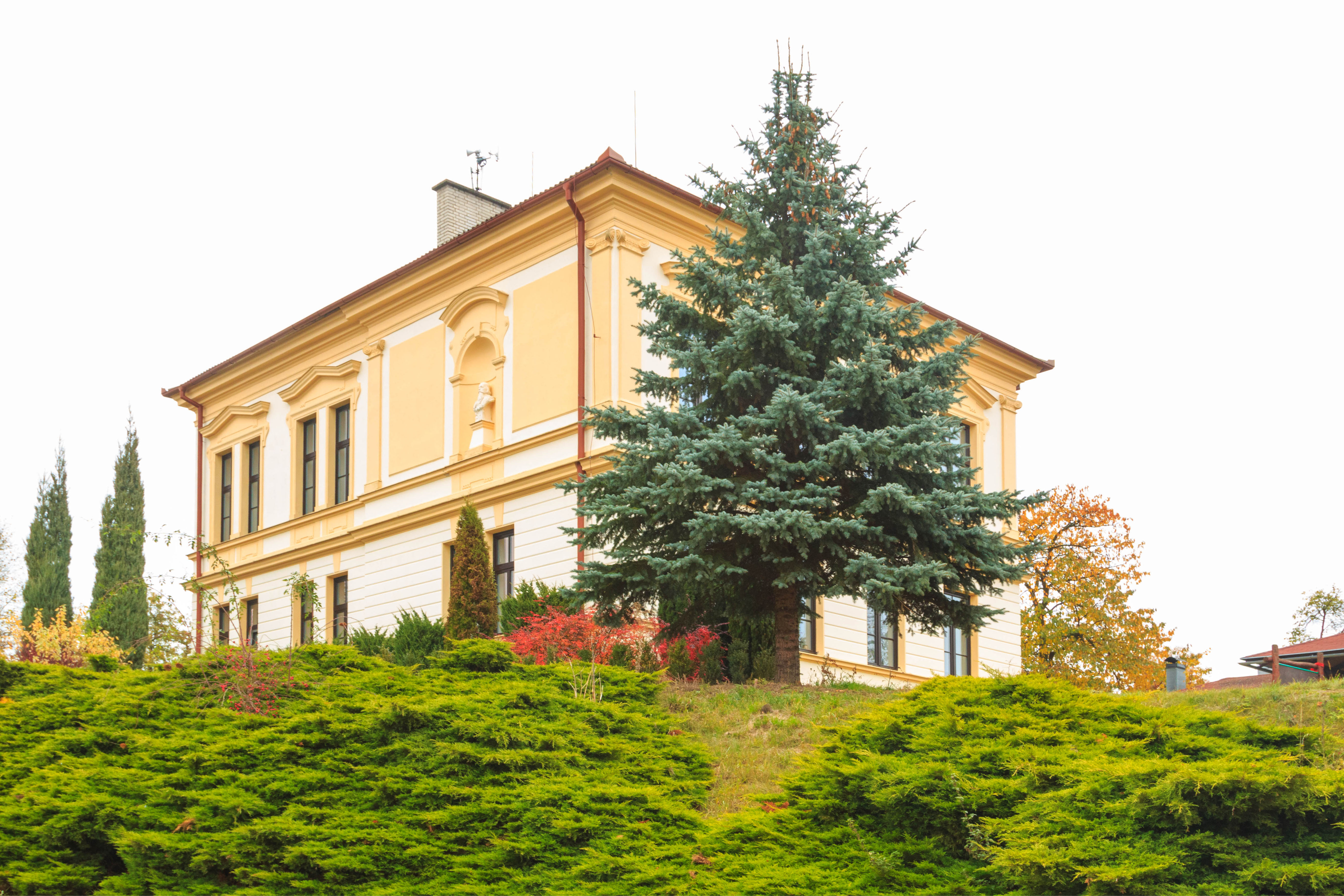 Libel - obecní úřad